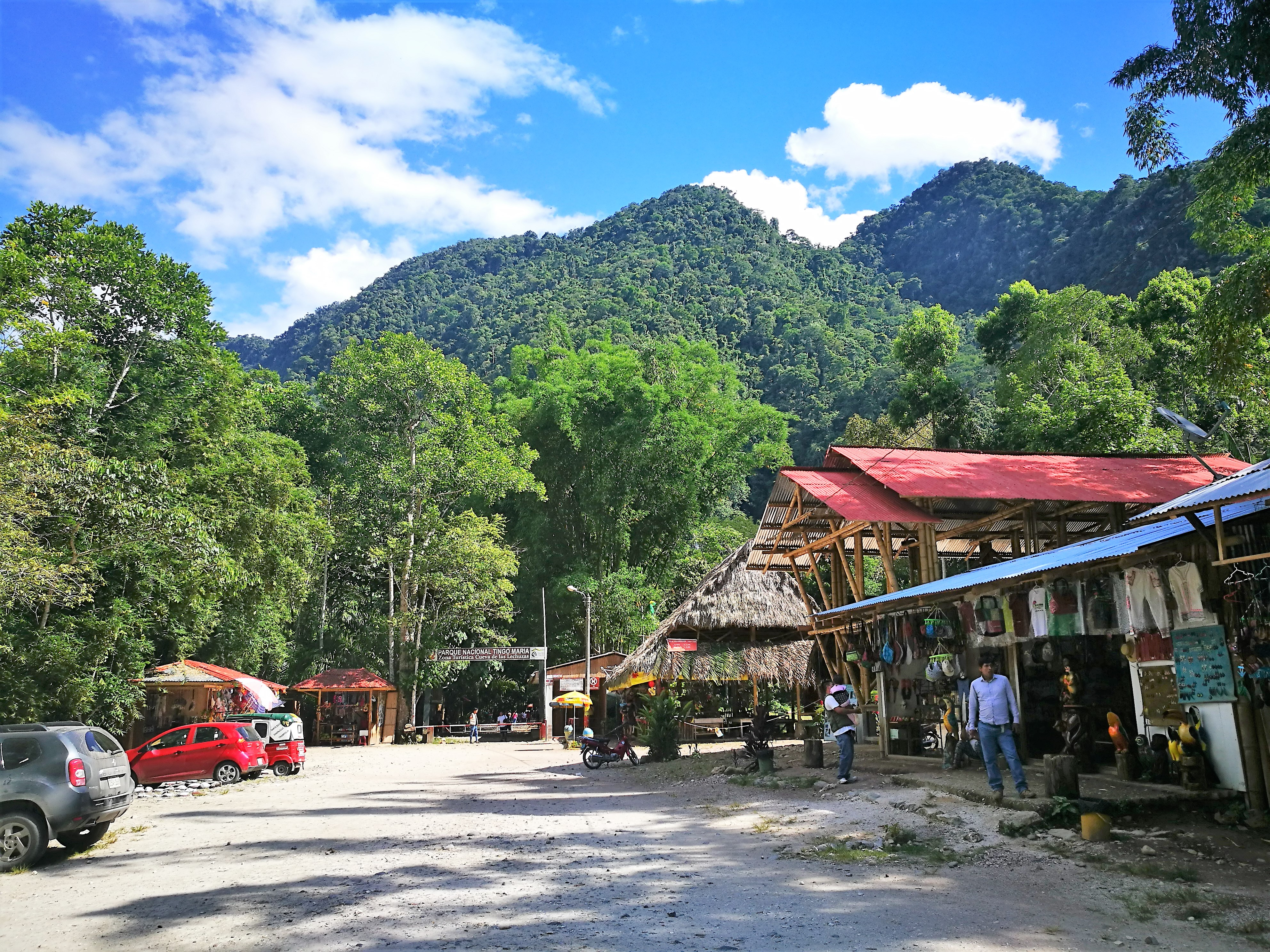 Entrada a la zona turística de la Cueva de las Lechuzas del Parque Nacional Tingo María